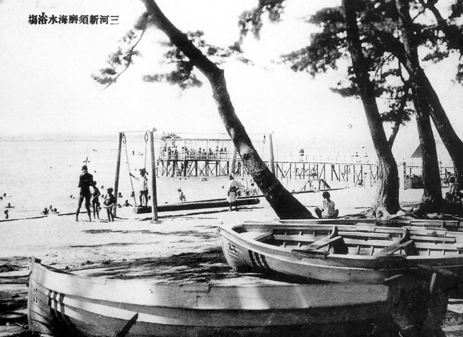 白砂青松の新須磨海岸（大正末期）